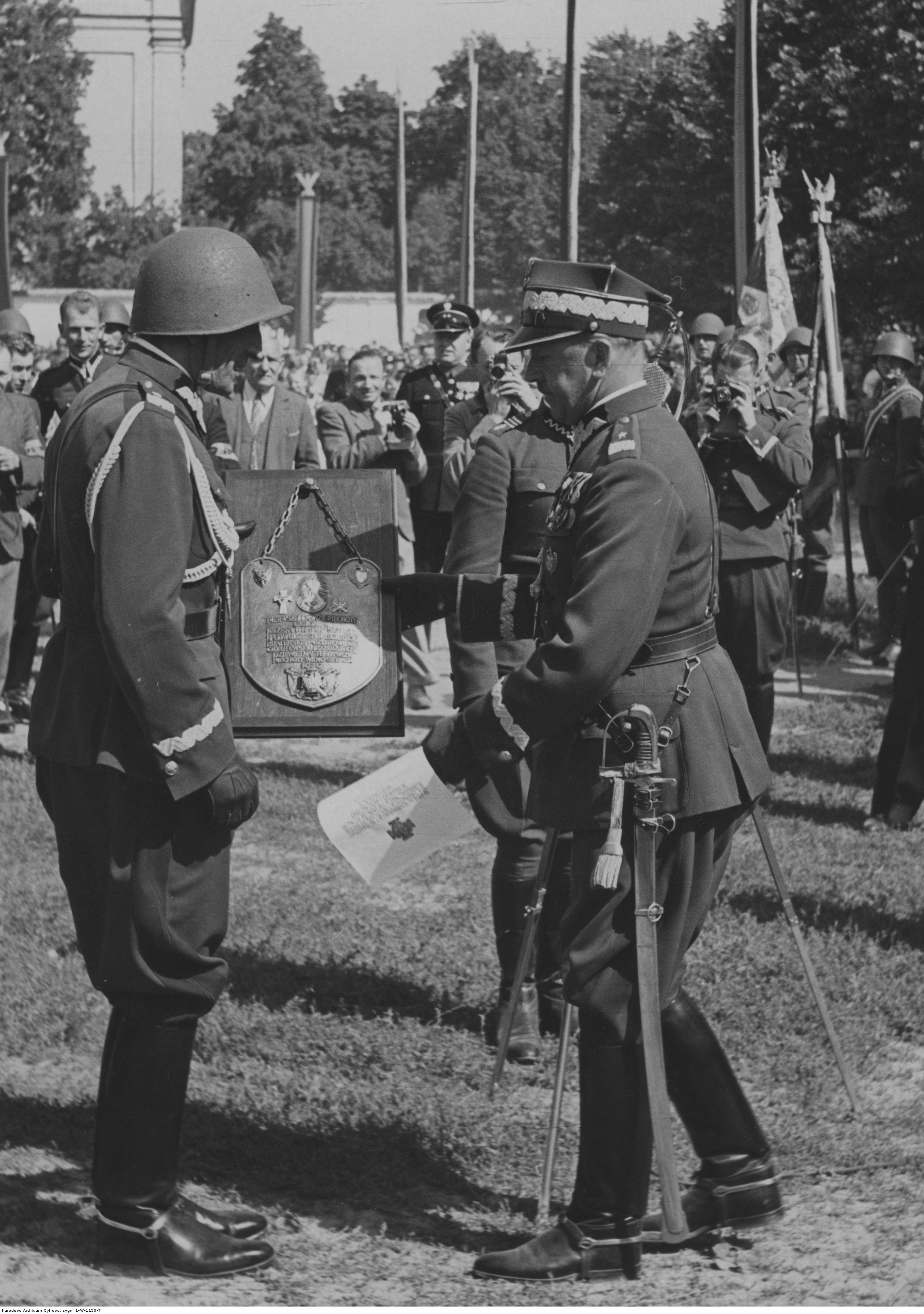 Jubileusz dwudziestopięciolecia 1. Dywizji Piechoty Legionów w Wilnie - wręczenie pamiątkowego ryngrafu. Widoczni m.in.: gen. Wincenty Kowalski (z lewej) i gen. Józef Kwaciszewski (z prawej). Koncern Ilustrowany Kurier Codzienny - Archiwum Ilustracji. Sygnatura: 1-W-1150-7